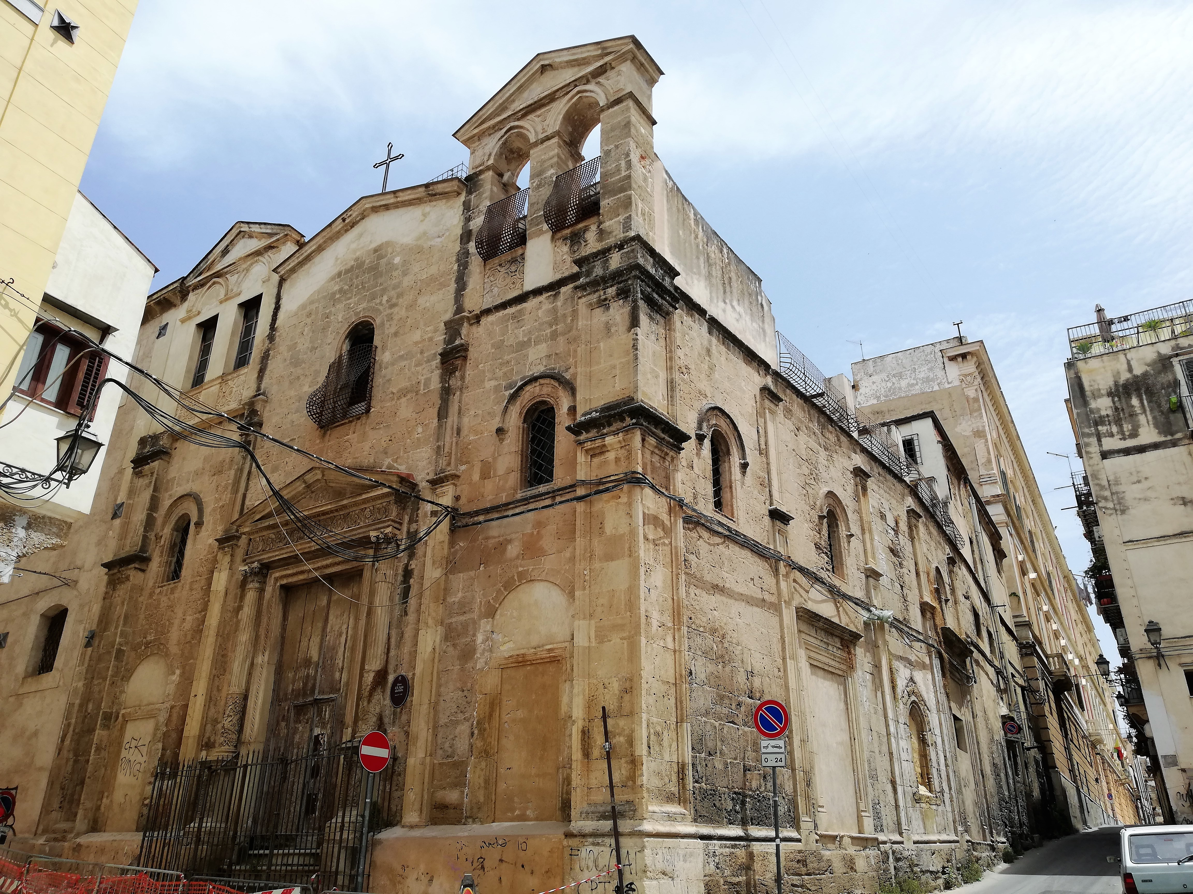 Veduta della facciata e del prospetto occidentale.